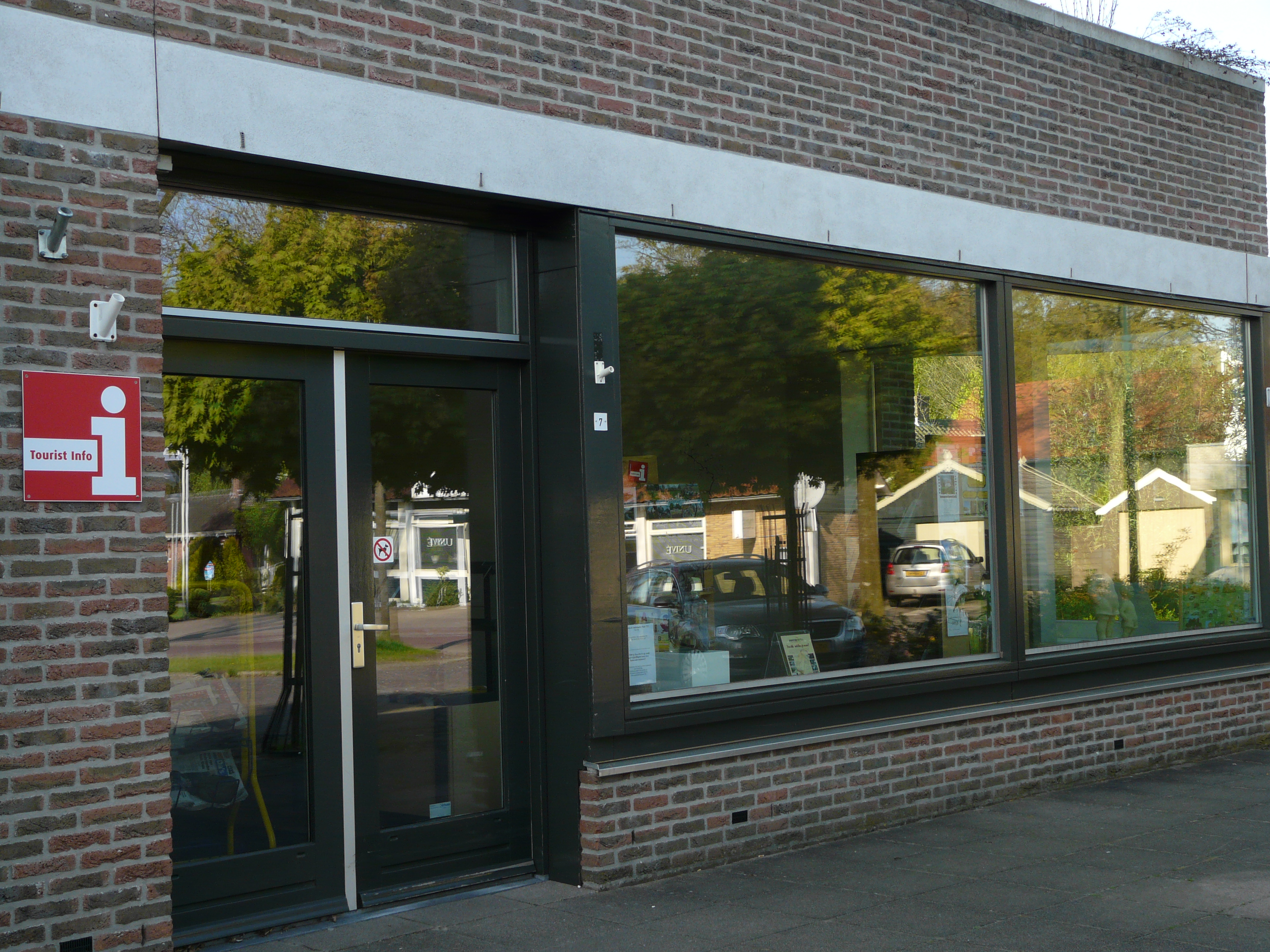 Voormalige Toerist Informatie Punt (TIP) op Piet Soerplein in Havelte